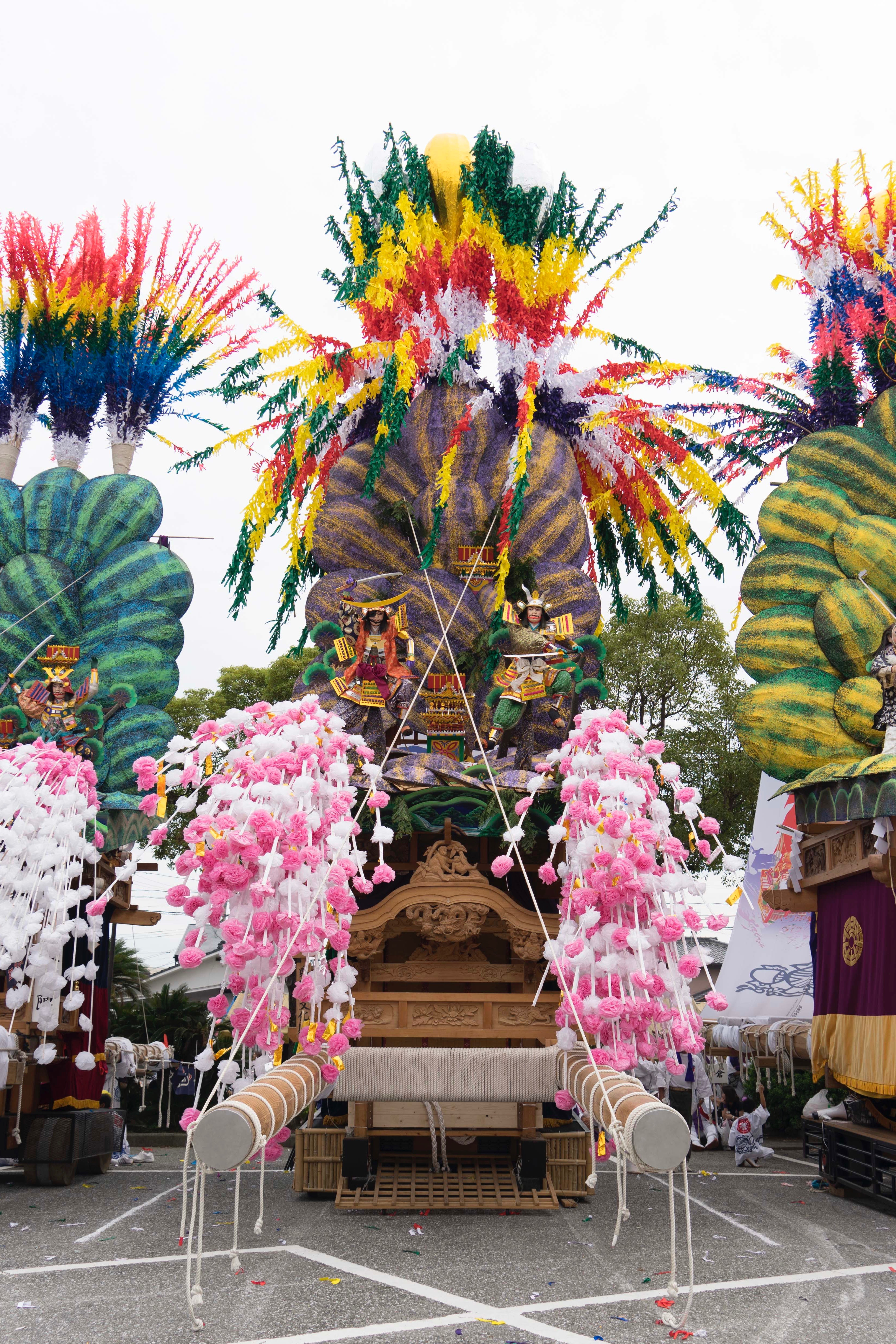 苅田山笠 集区の岩山